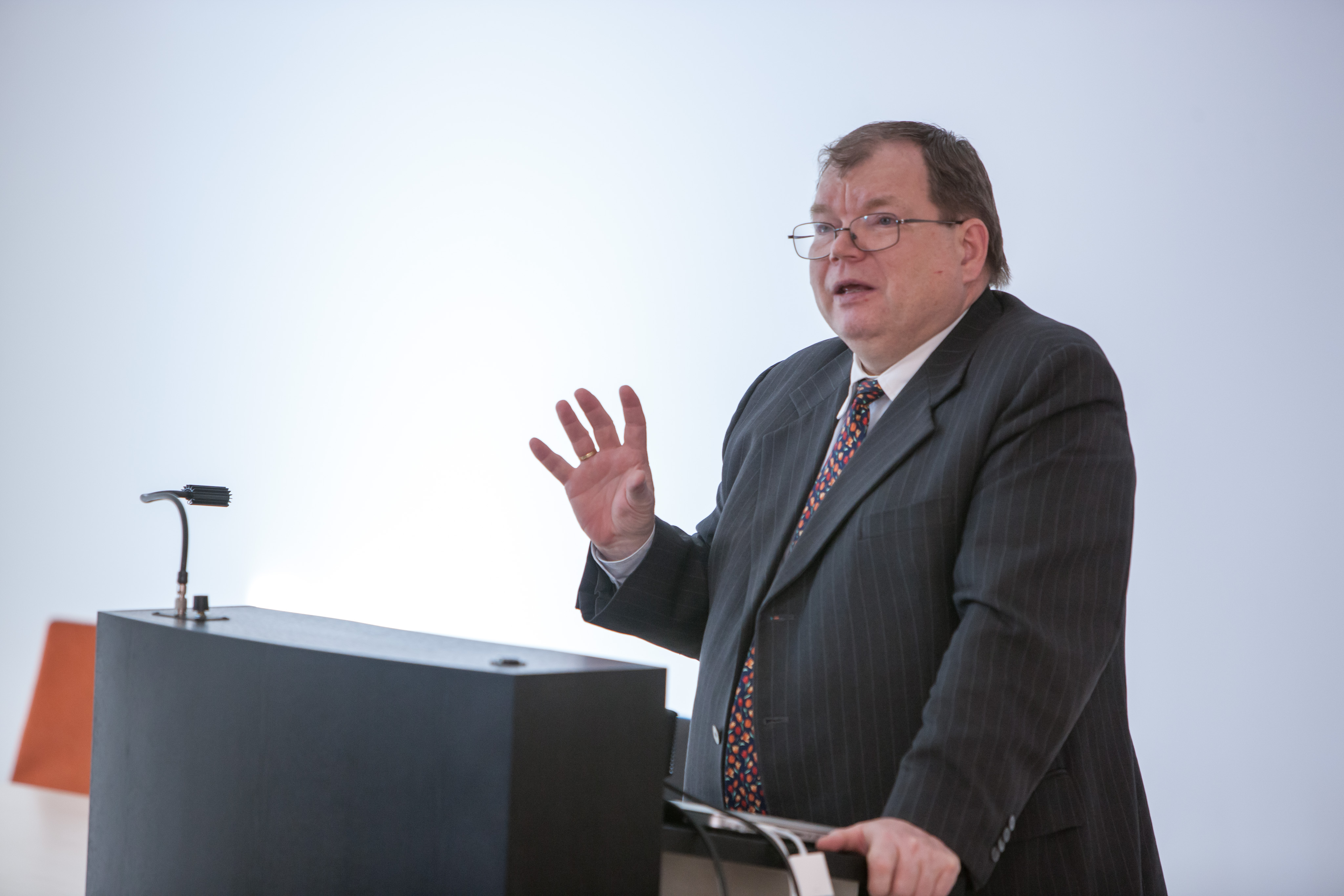 25. aprillil 2012 tähistasid TÜ Eesti Geenivaramu ja Teaduskeskus AHHAA rahvusvahelist DNA päeva ning huvilistele tutvustati vastavatud Geeni- ja Biotehnoloogia keskust (Riia 23B). Pildil TÜ Eesti Geenivaramu direktor akadeemik Andres Metspalu.